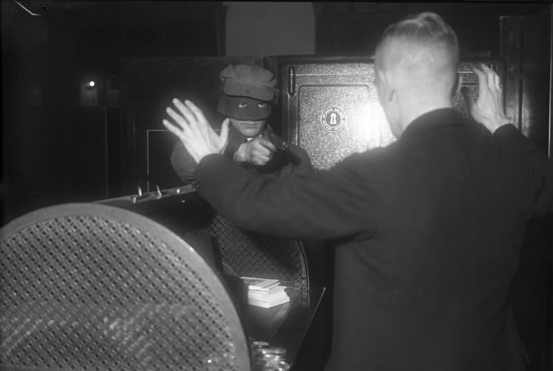 Hilfe, Überfall!!! Bankschalterraum unmöglich! An den Bankschaltern der Grossbanken und Sparkassen hat man ganz neuartige Überfallzahltische, welche das Rauben von Geld unmöglich machen, aufgestellt. Der Überfallzahltisch, eine Erfindung der Geldschrankfabrik Arnheim, kann bei beabsichtigtem Überfall von verschiedenen Stellen des Kassenraumes aus in Tätigket gesetzt werden. Durch Druck auf einen Knopf dreht sich das ganze Zahlenbrett mit rasender Geschwindigkeit und das daraufliegende Geld verschwindet in den darunterliegenden Tesor. Durch die Auslösung ertönt ein Alarmsignal, welches das Publikum ausserhalb des Bankhauses auf den Überfall aufmerksam macht. Der Kassierer wird von dem Räuber an dem Überfallzahltisch überrascht.